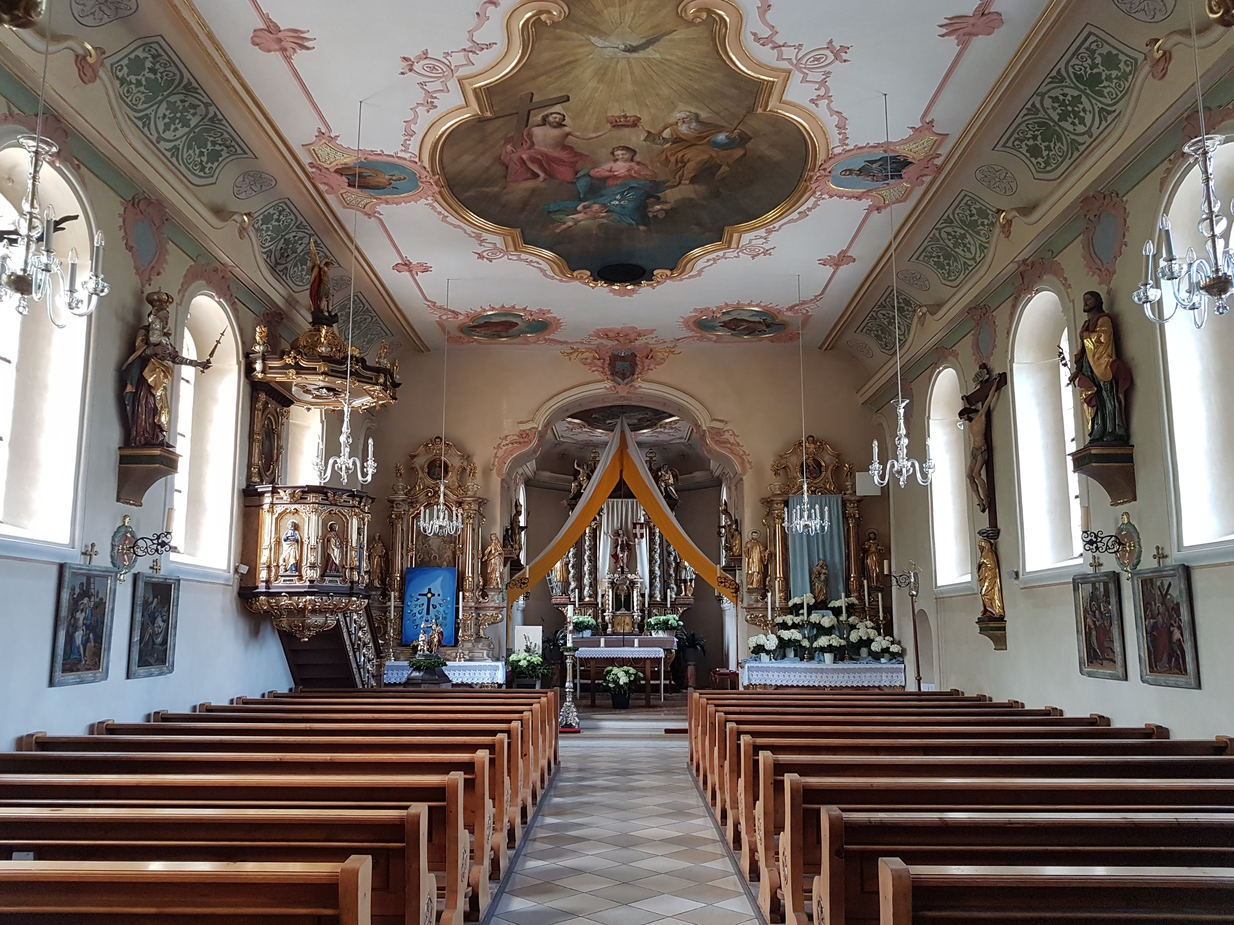 St. Laurentius (Petershausen), Innenraum mit Blick zum Chor